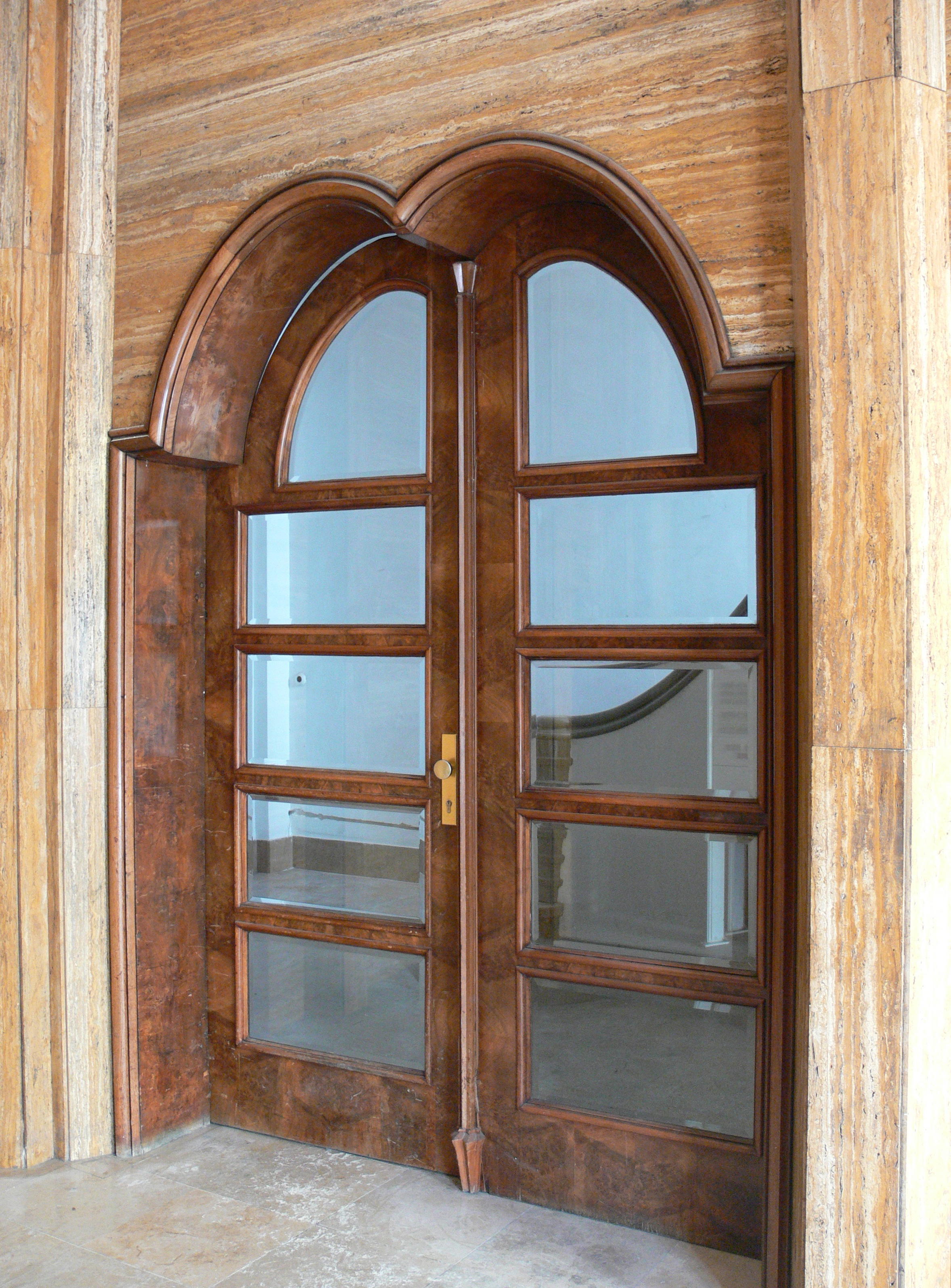 Cammann-Hochhaus (Chemnitz-Furth)